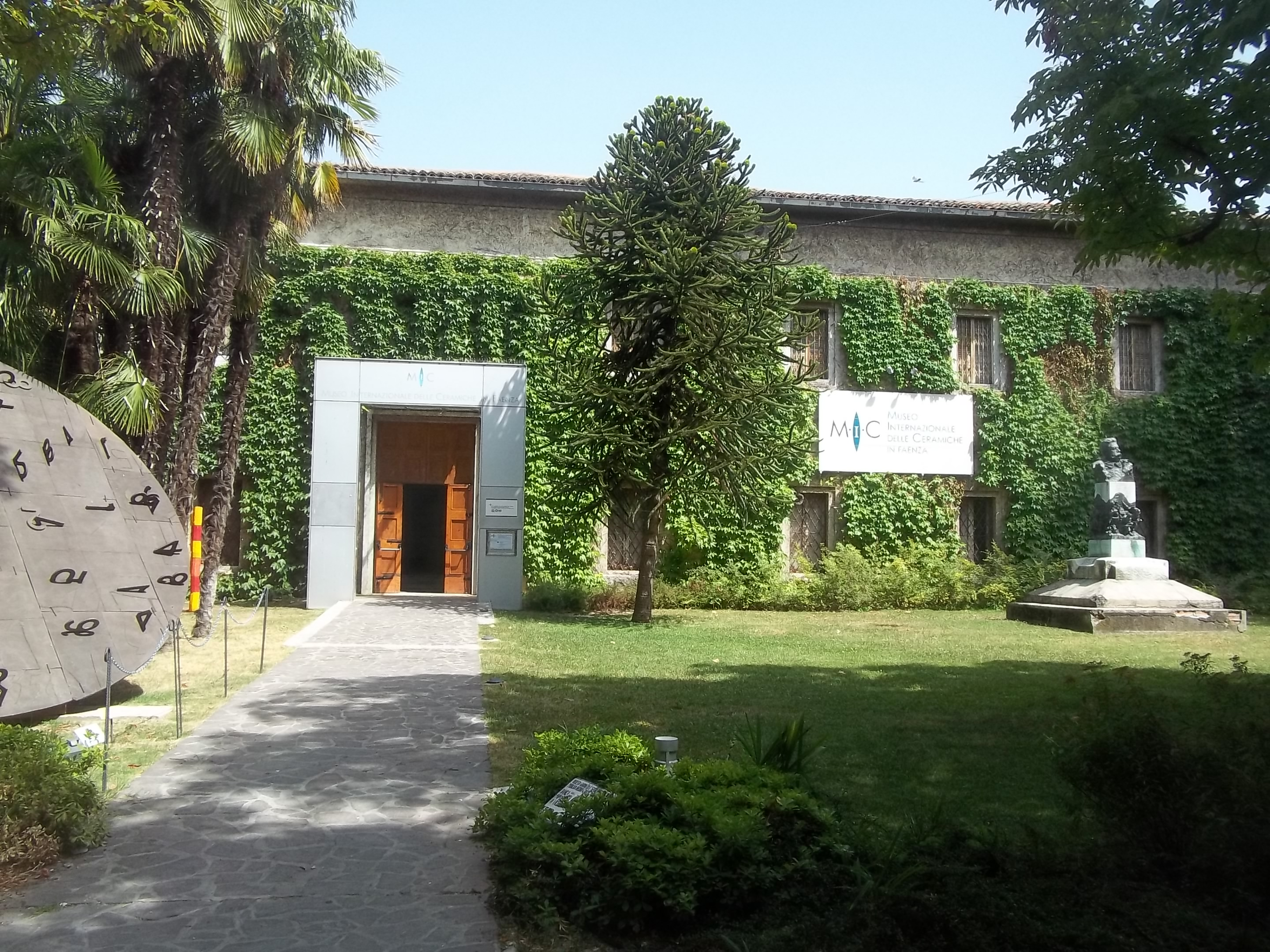 המוזיאון הבינלאומי לקראמיקה